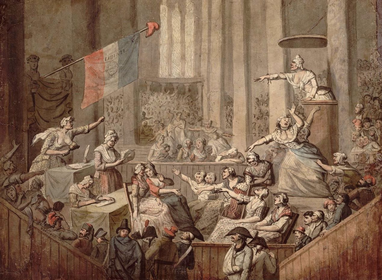 Dessin à la plume et encre de Chine, lavis à l'encre de Chine et aquarelle, par Chérieux, 1793.